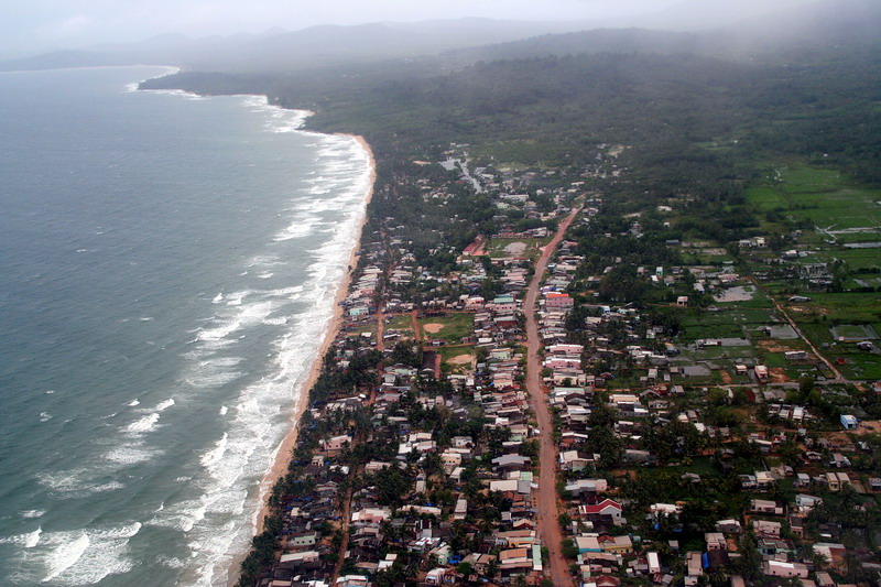 Le littoral de Phu Quoc